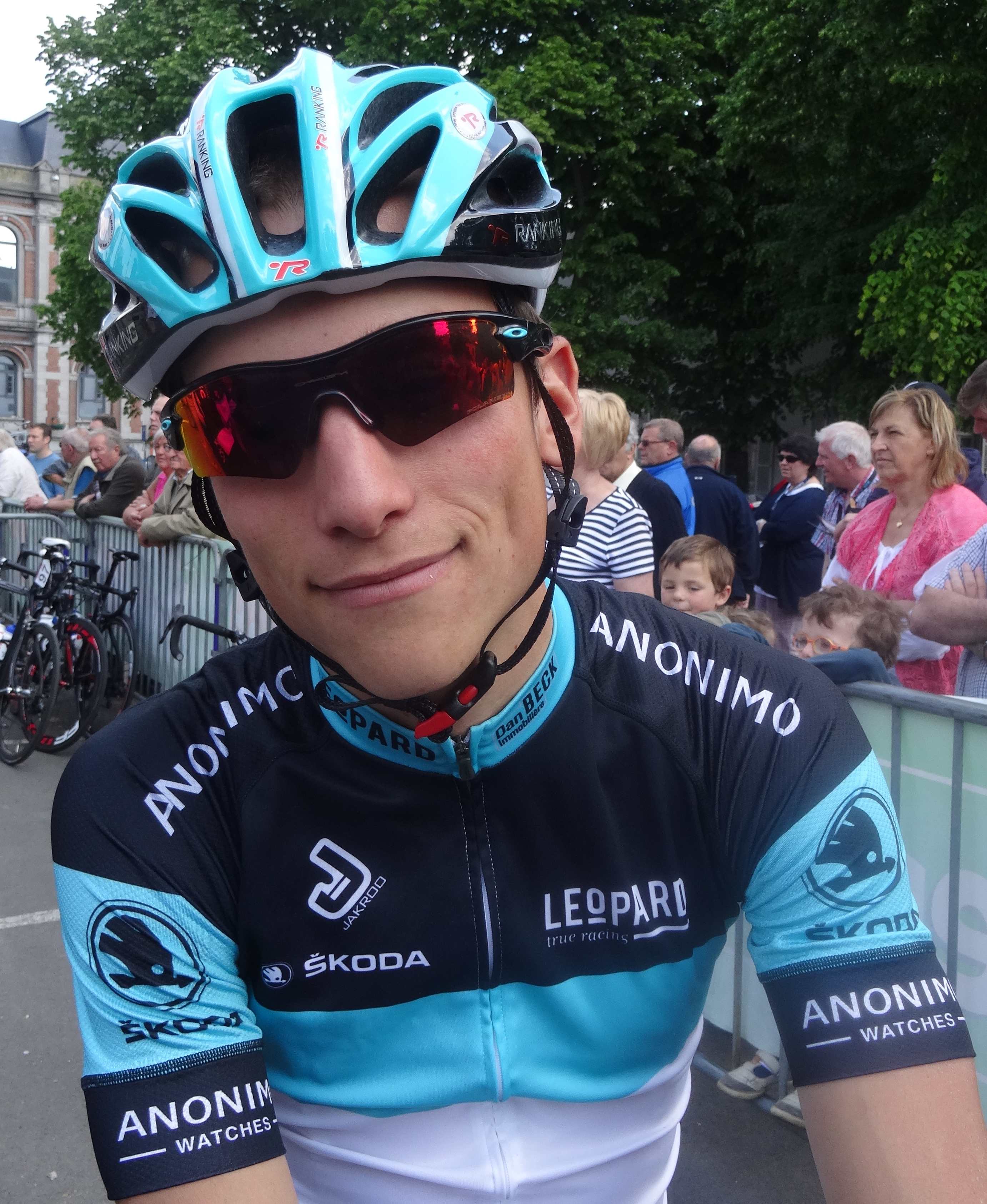 Reportage réalisé le samedi 17 mai à l'occasion du départ du Grand Prix Criquielion 2014 à Boussu, Belgique.